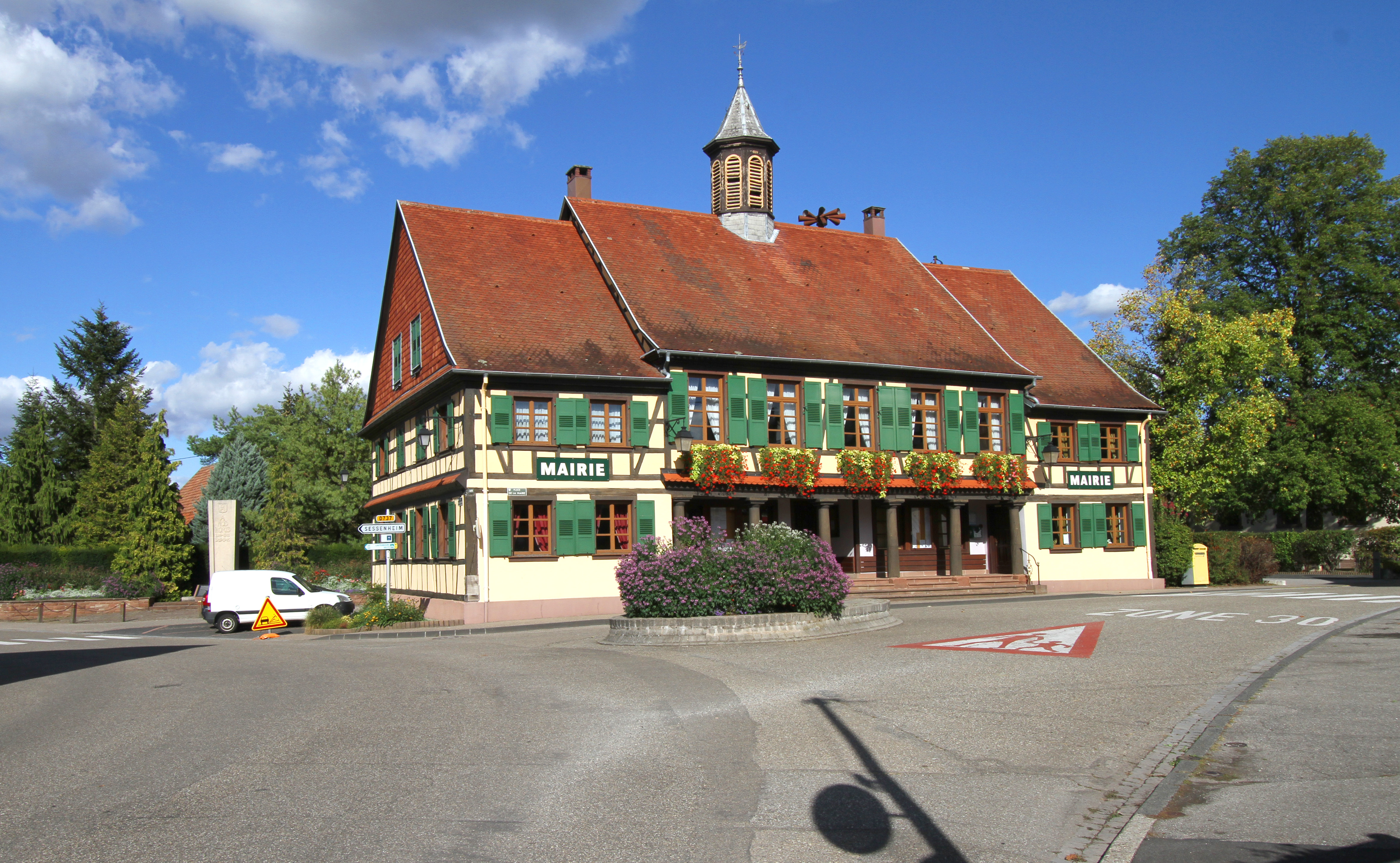 Dalhunden